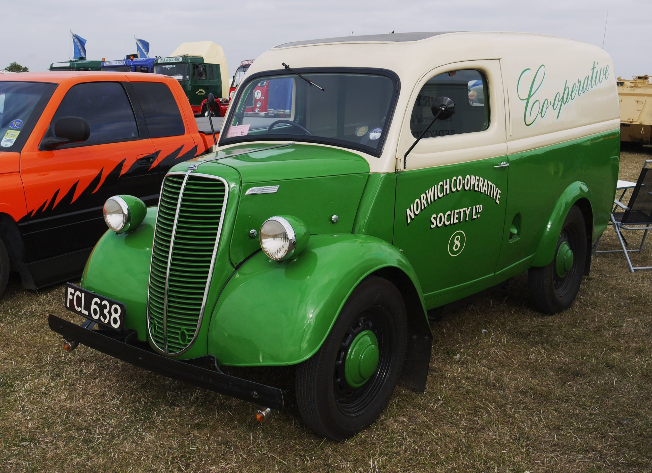 Panasonic G1